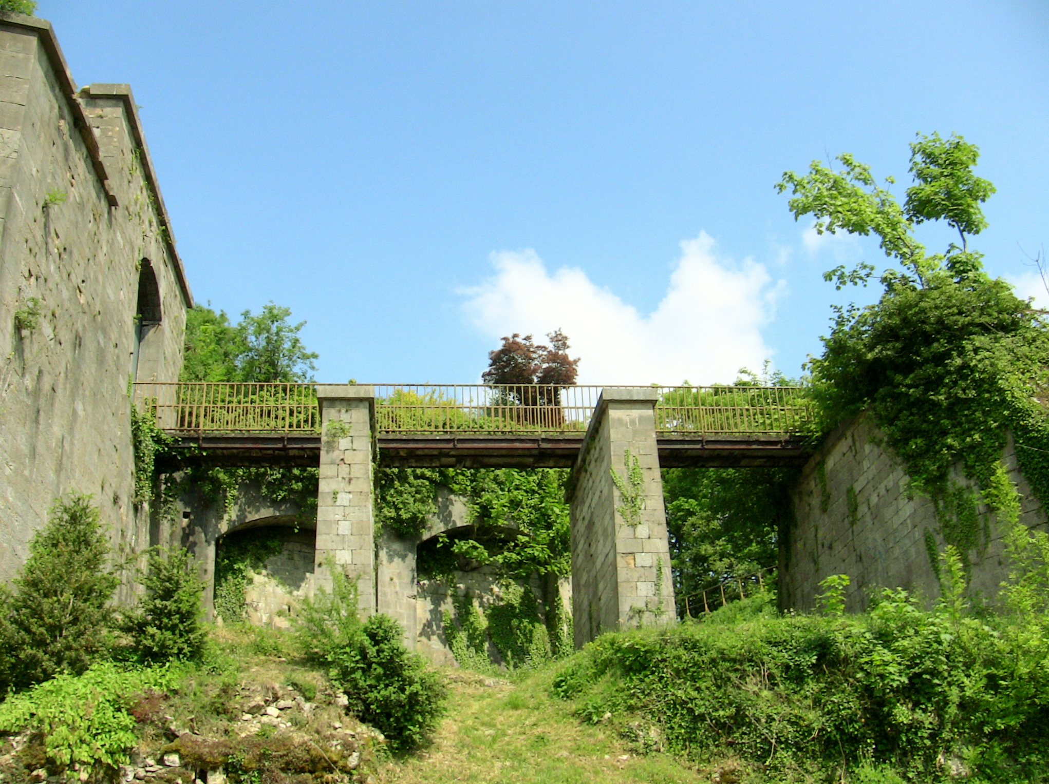 Le ponton du fort de Beauregard à Besançon (Doubs, France).